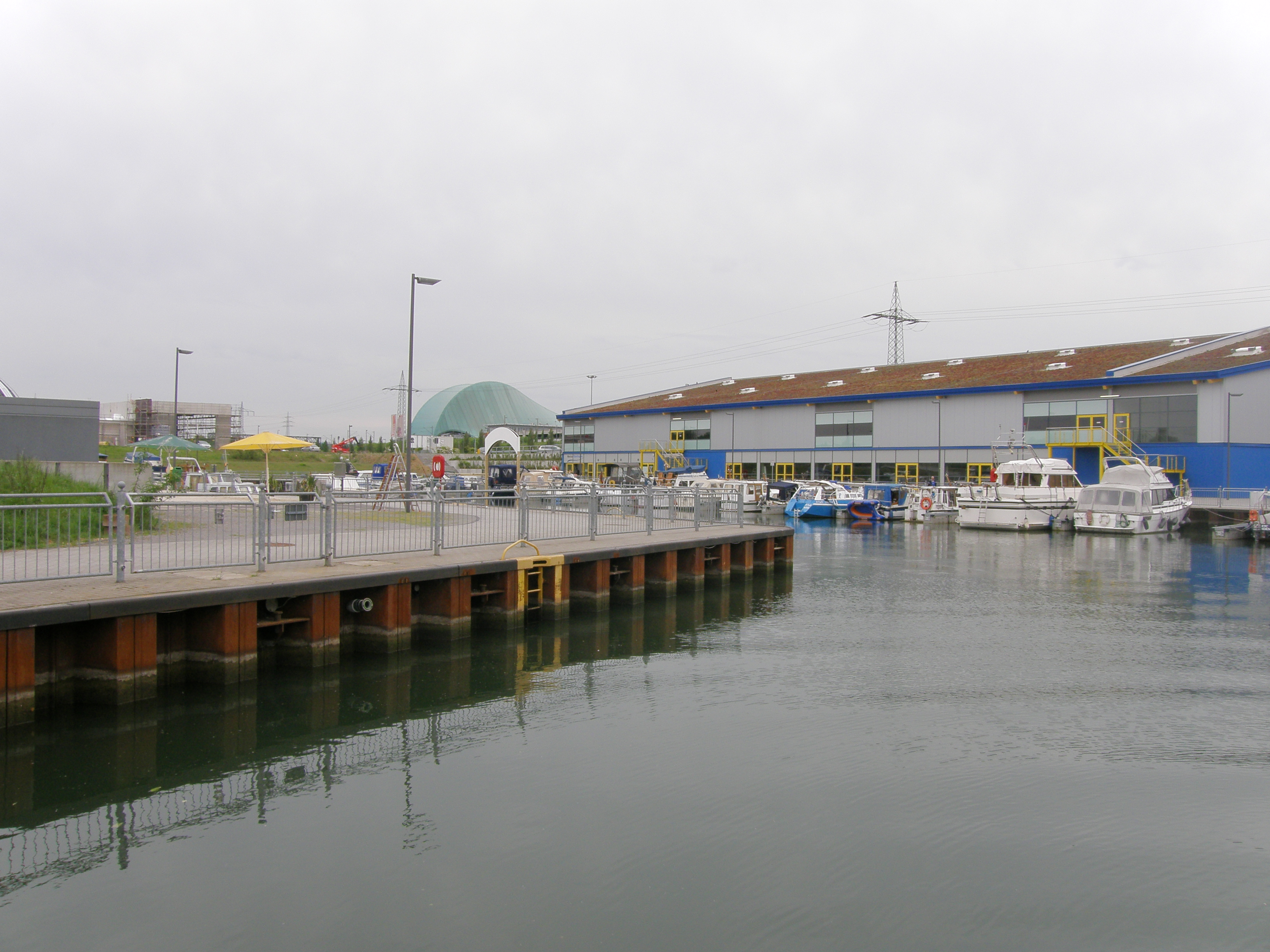 Sportboothafen am Rhein-Herne-Kanal in der Nähe der Neuen Mitte Oberhausen Blick zurück vin der Einfahrt auf die Marina, im Hintergrund die Musicalbühne Metronom Theater